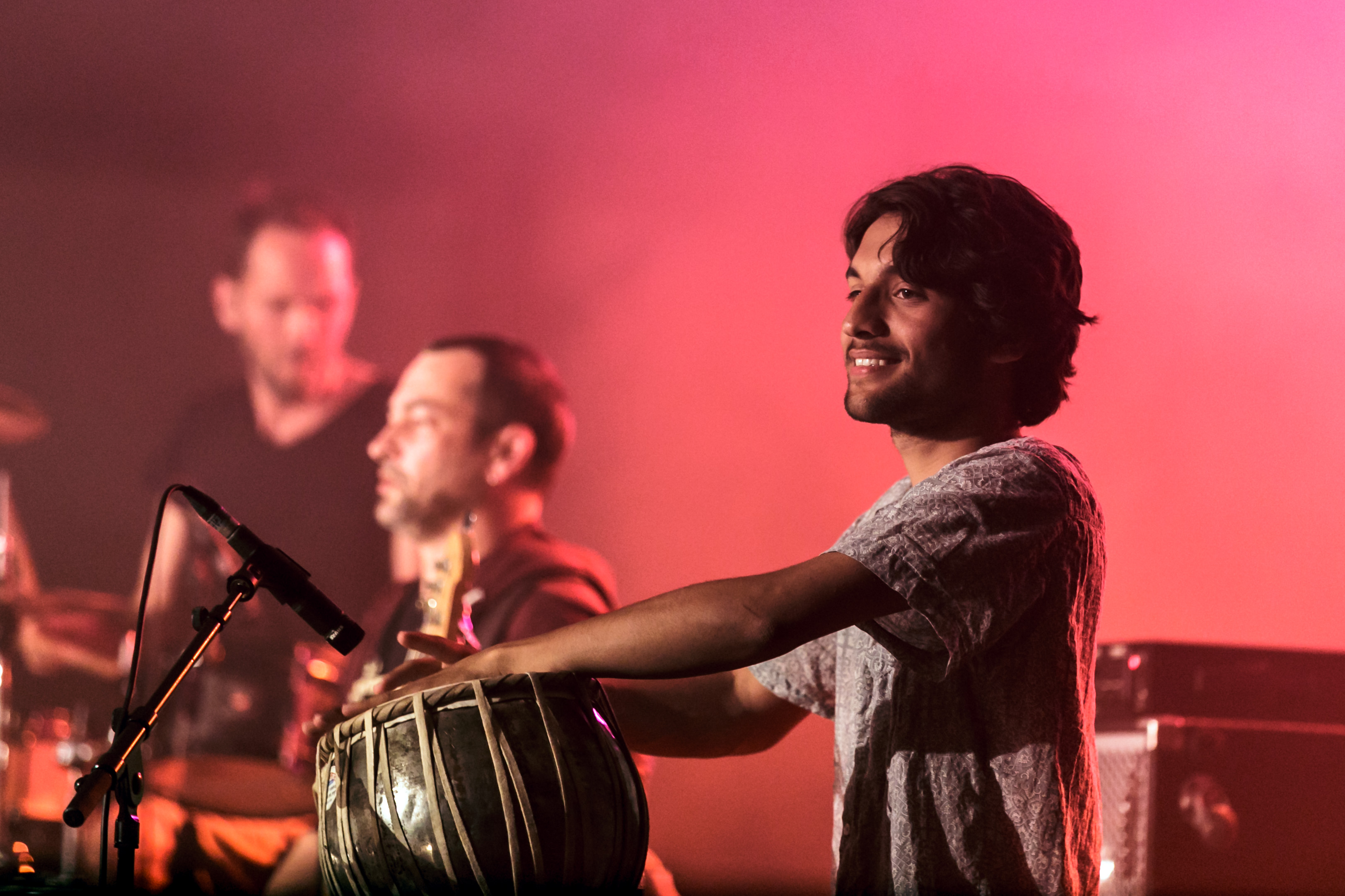 Ilyas Raphaël Khan en invité avec le groupe Hiks en fest-noz place Saint-Corentin à Quimper lors du festival de Cornouaille le 21 juillet 2016.